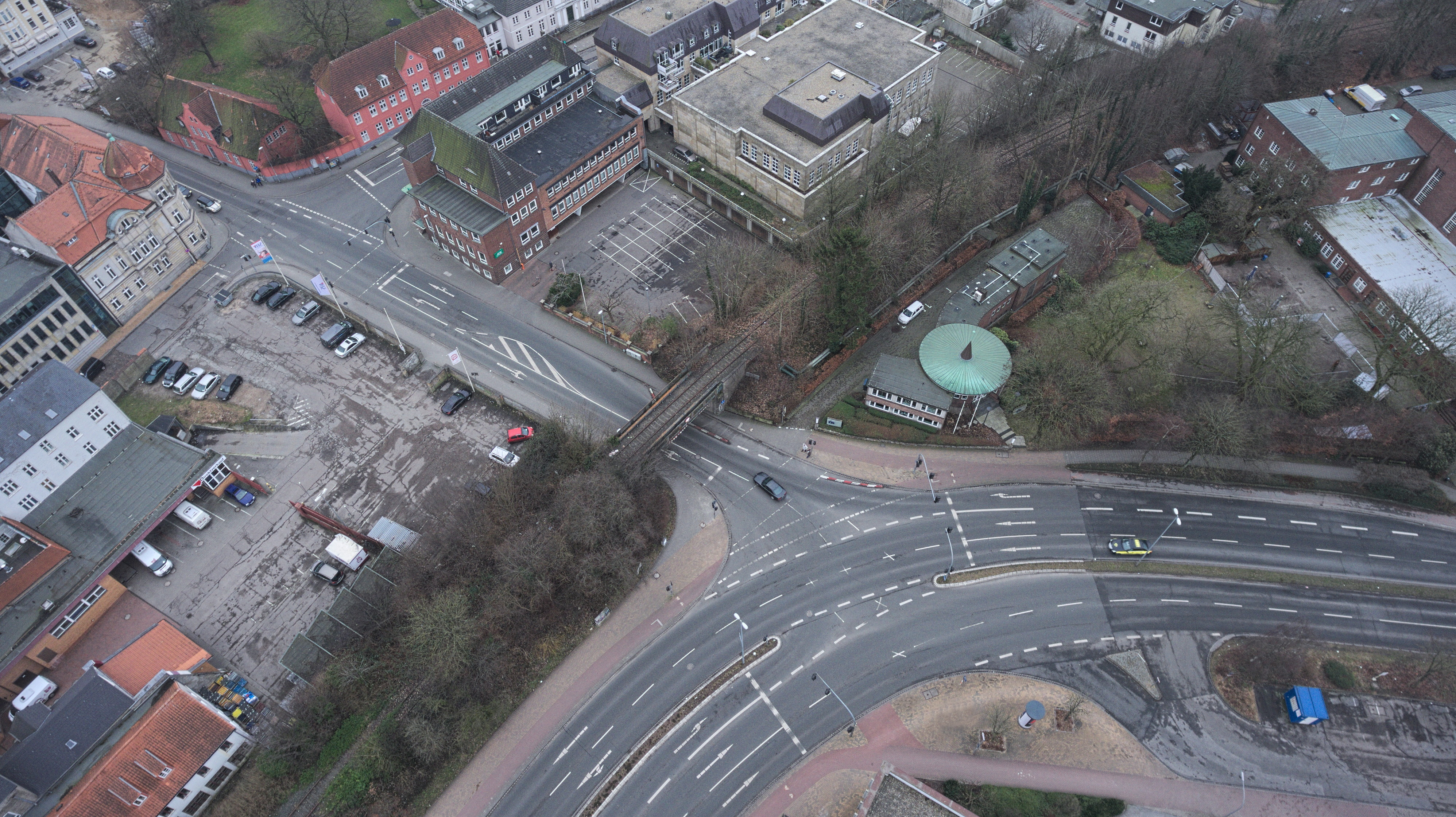 Draufsicht auf die Verkehrsfuehrung Heinrichstrasse Ecke Friedrich-Ebert-Straße